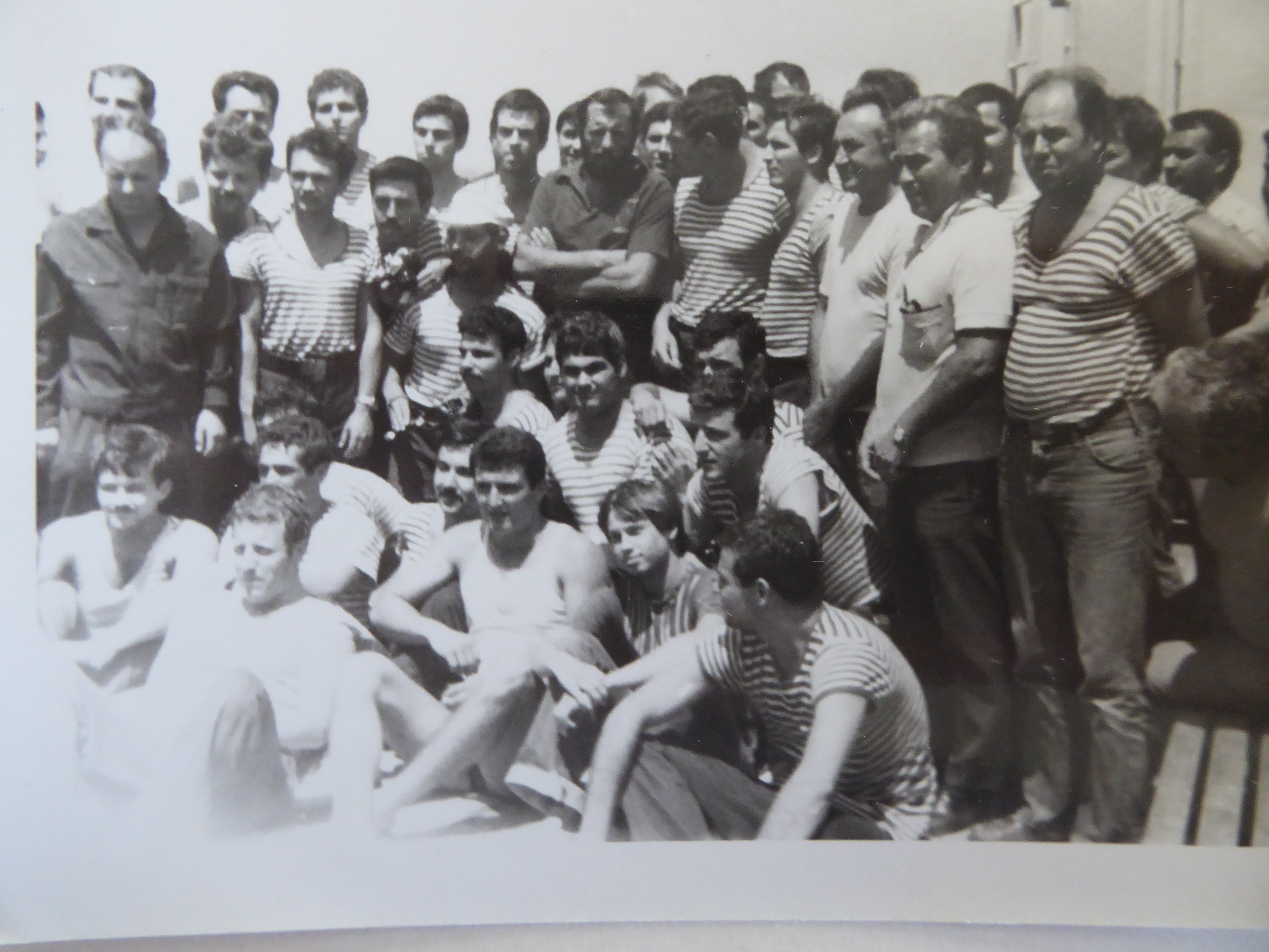 Schulschiff Vaptsarov der Marineakademie Varna-Bulgarien auf Ausbildungsreise trifft auf hoher See Weltumsegler N. Djambazov